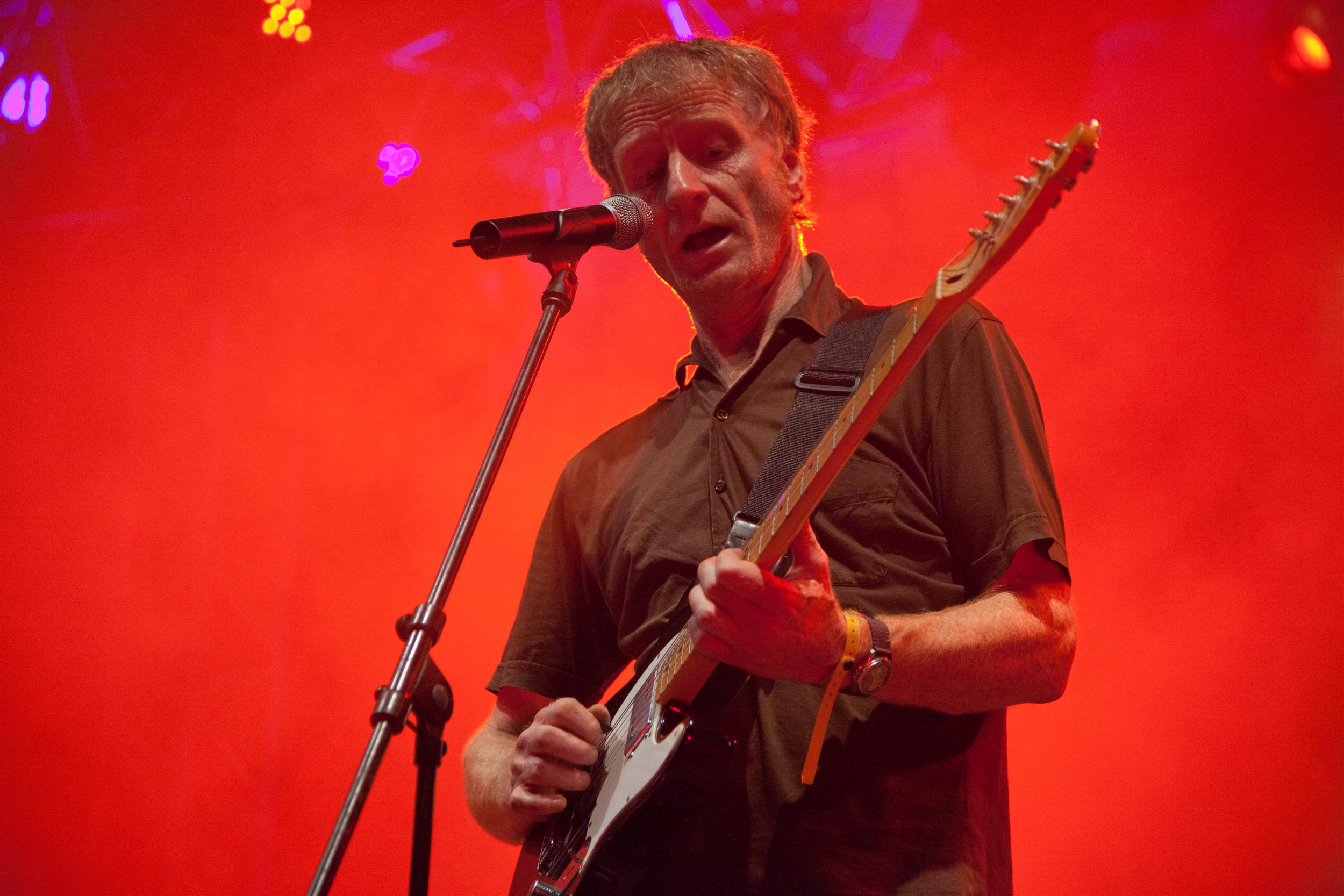 Alterna2 - Foto: Xavi Torrent